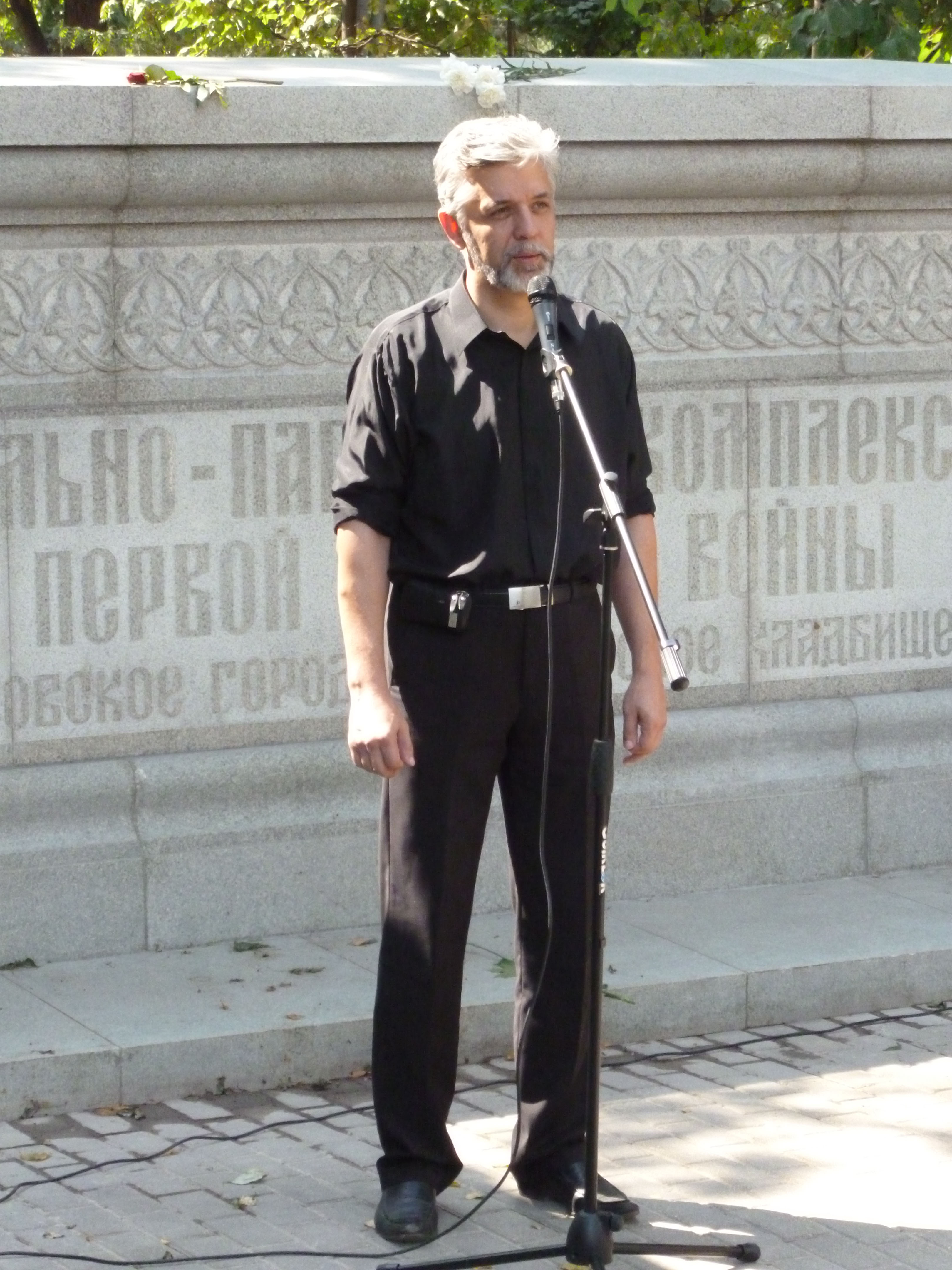 Андрей Савельев на территории Мемориально-паркового комплекса героев Первой мировой войны выступает на митинге, приуроченному к 100-летию Первой мировой войны.